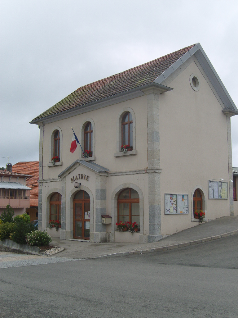 Mairie des Hôpitaux-Vieux (Doubs - France)